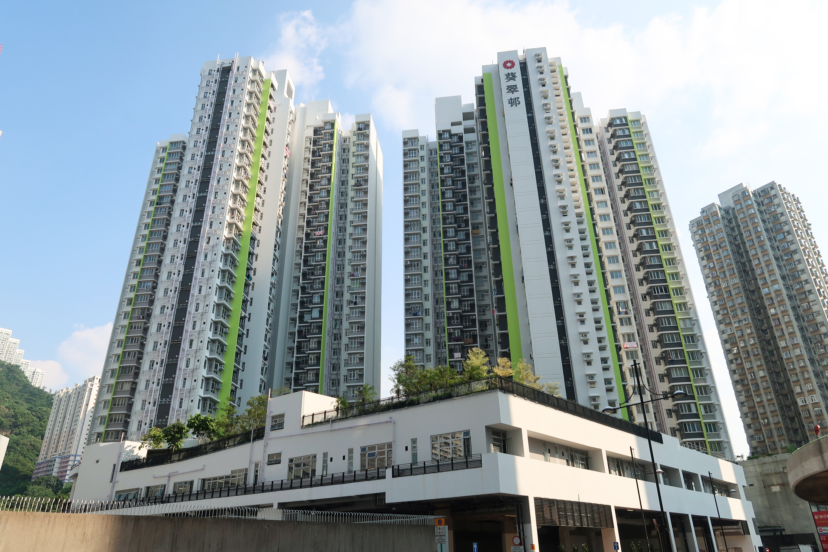 Kwai Tsui Estate